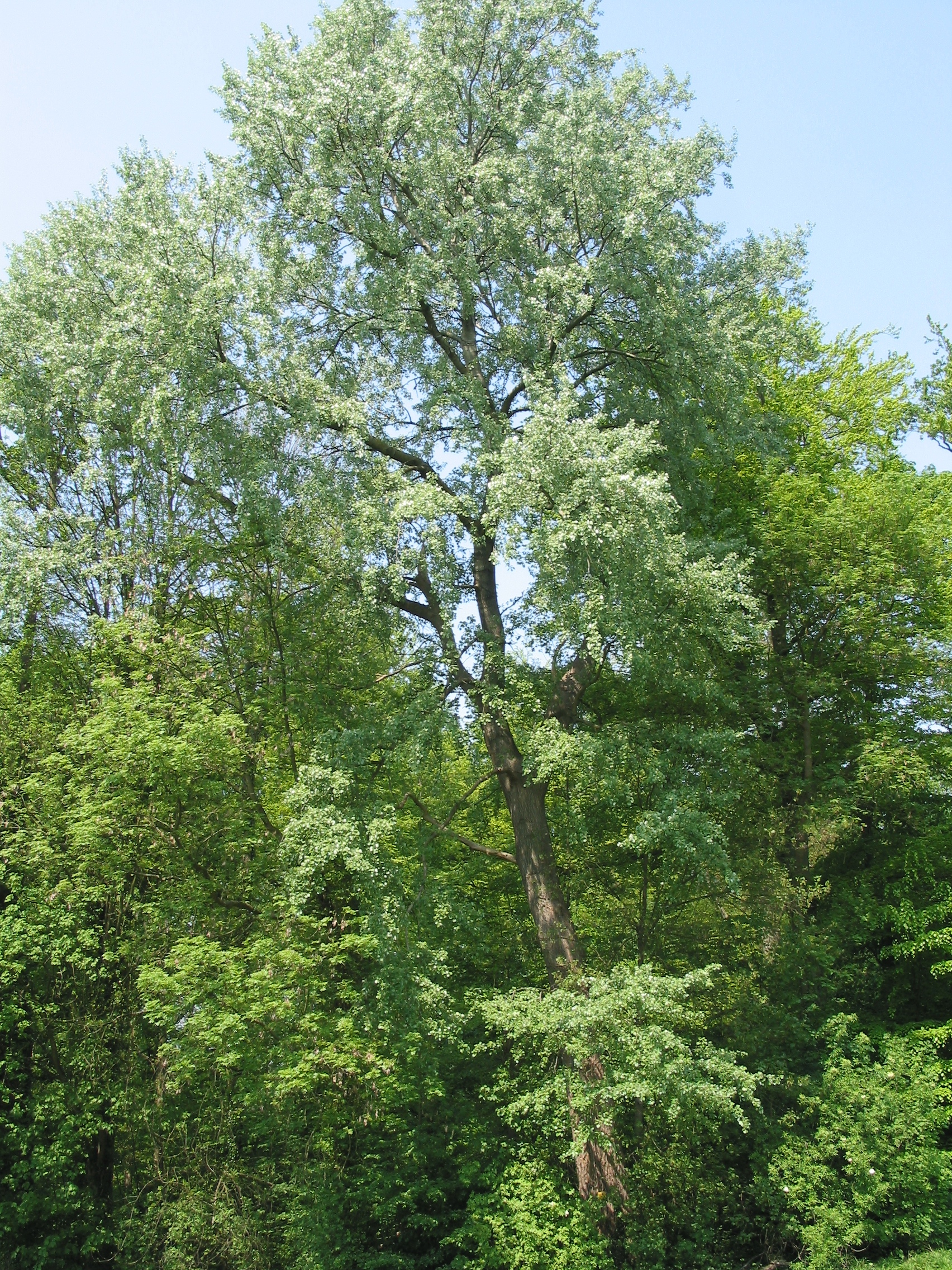 (Populus × canescens) 363cm (2007)